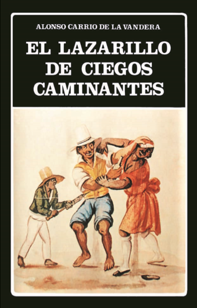 Es publicado por la biblioteca ayacucho en caracas.